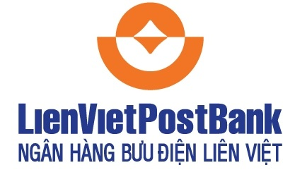 Logo LienVietPostBank